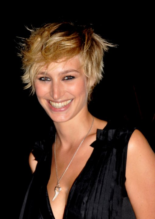 Pauline Lefèvre au festival du film romantique de Cabourg